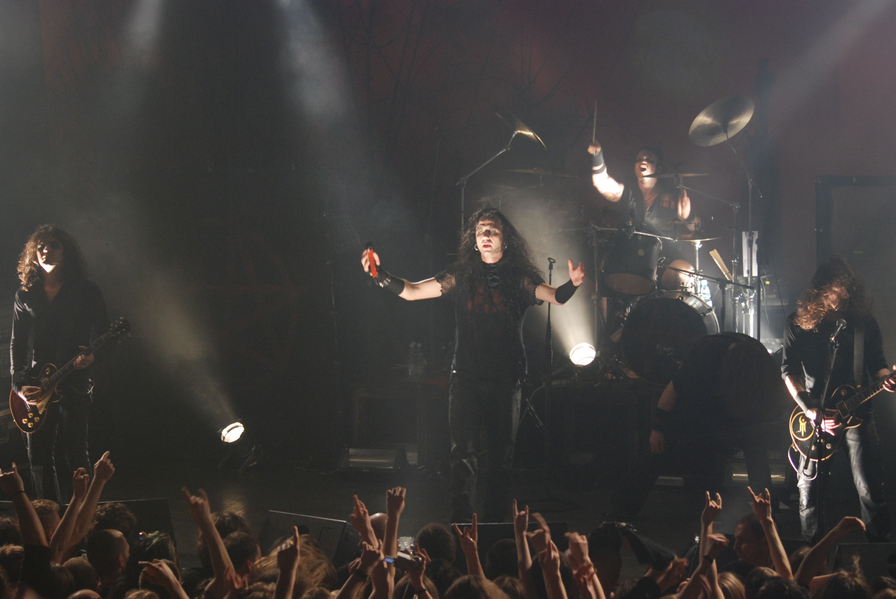 Koncert Moonspell'a w klubie Studio w Krakowie